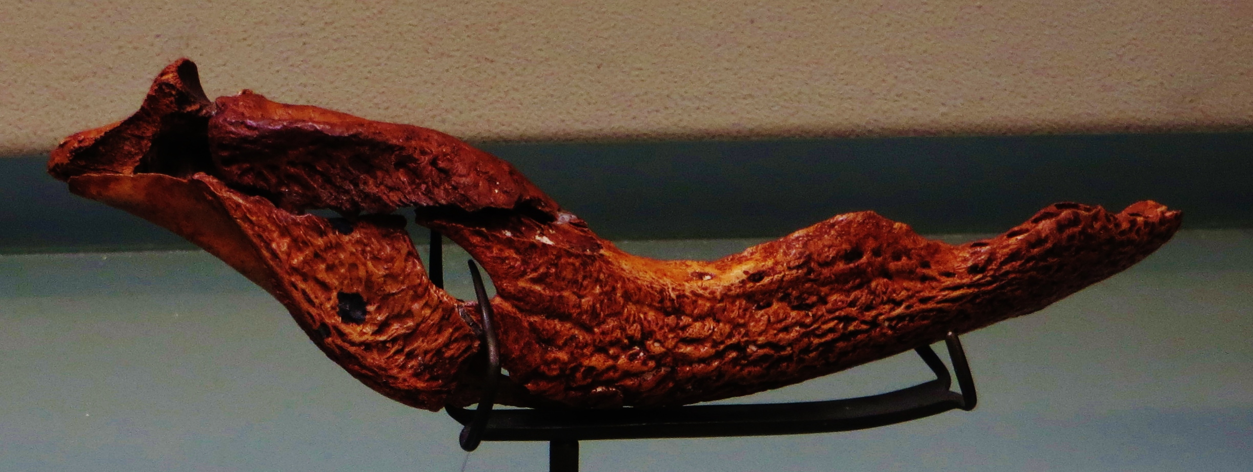 Fossil of Mekosuchus, an extinct reptile- Took the photo at Musee d'Histoire Naturelle, Paris